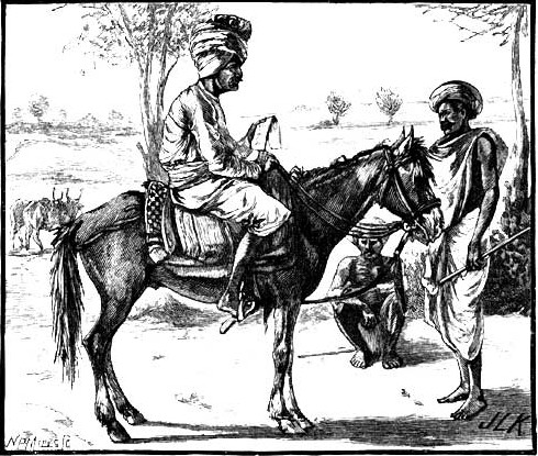 A money-lender on a Deccan pony - John Lockwood Kipling, Beast and Man in India.